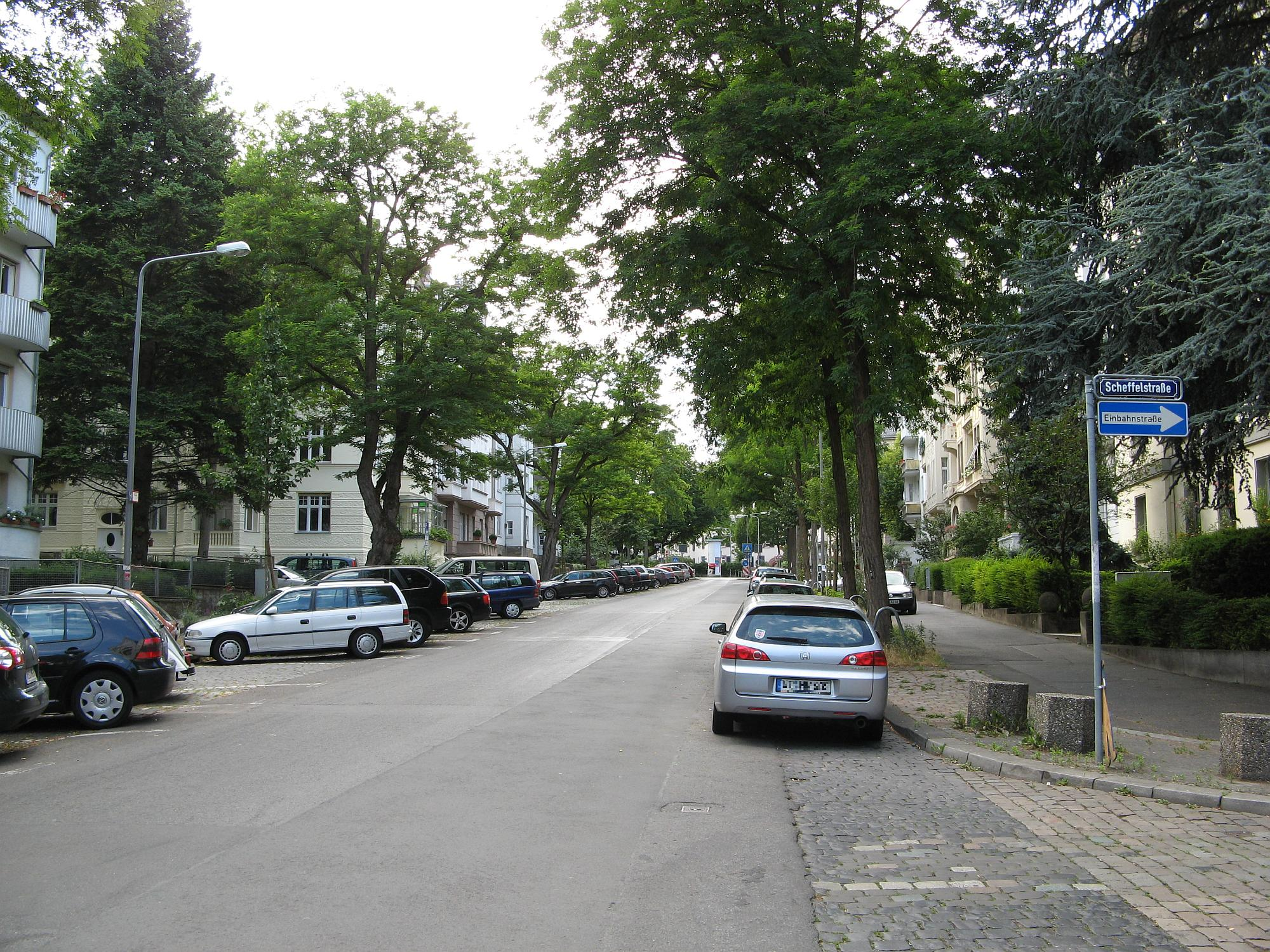 Dichterviertel in Wiesbaden (Kleiststraße Ecke Scheffelstraße)